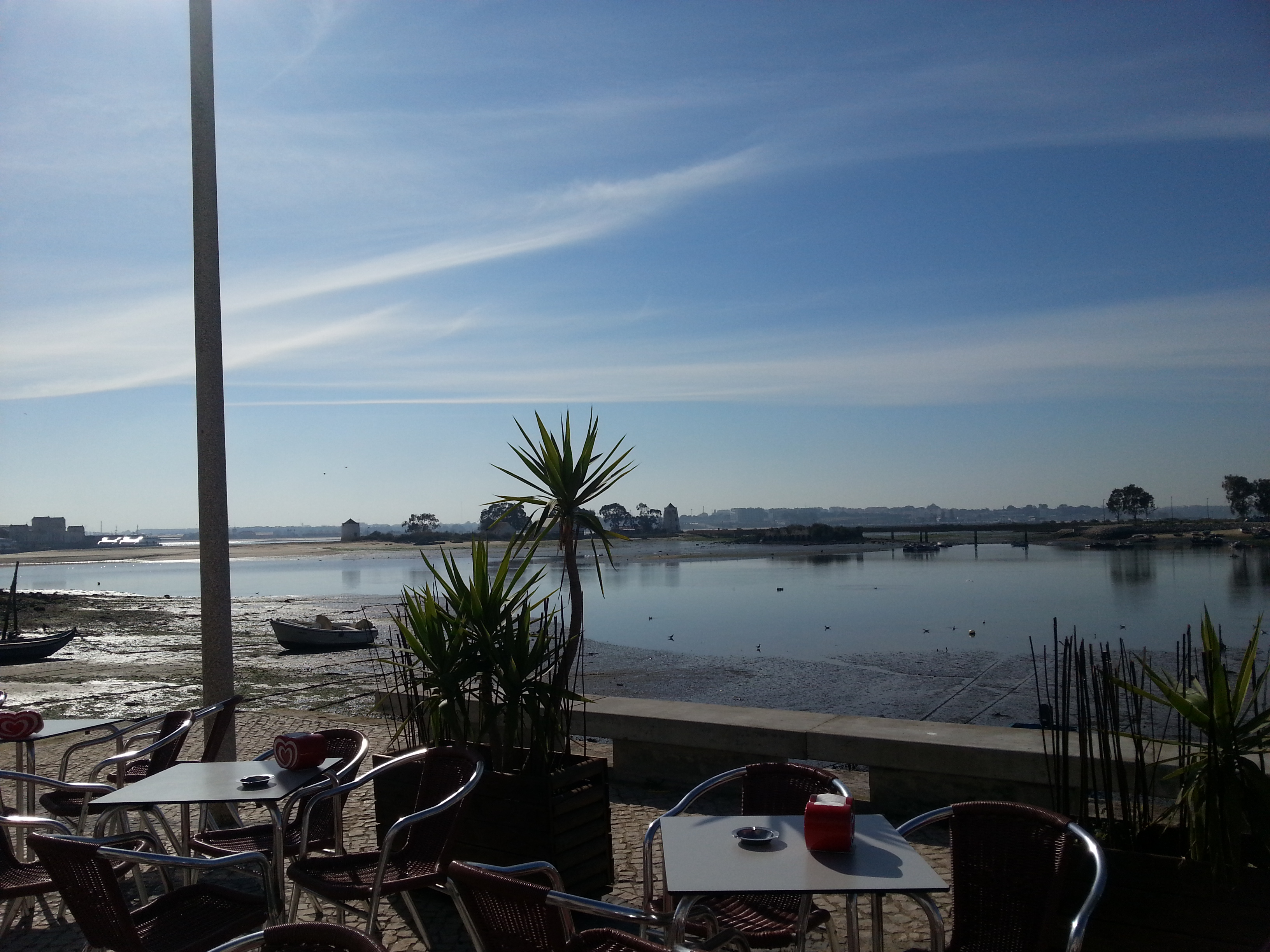 Vue du Tage au Coffeebox de la ville de Barreiro, Portugal